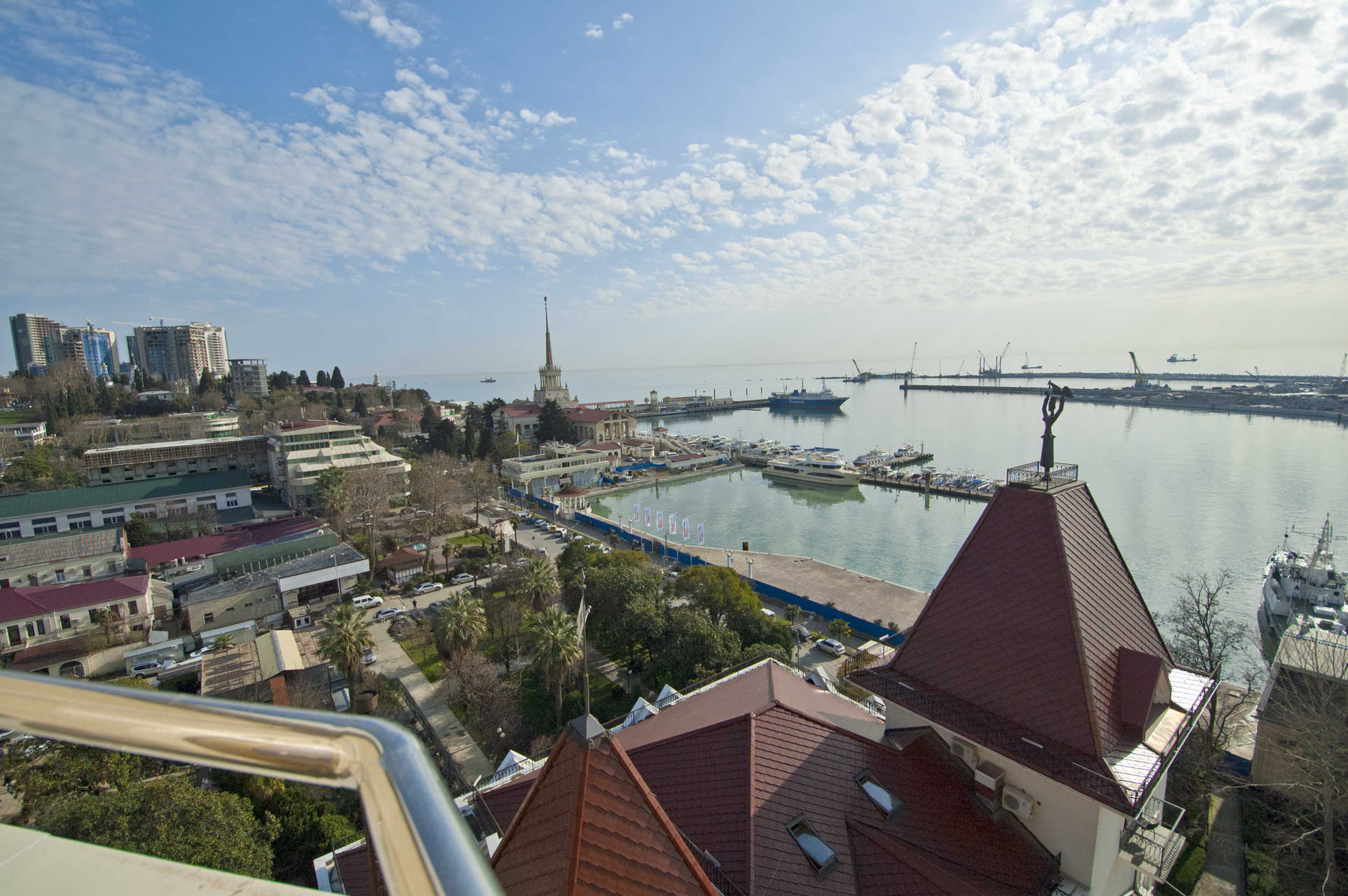 Здание морвокзала (Краснодарский край, Сочи, войкова улица, 1)